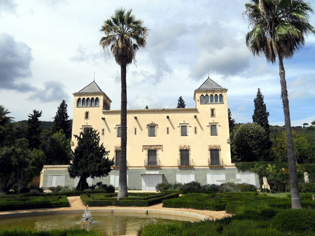 Palau del Marquesos de Sentmenat (Barcelona)